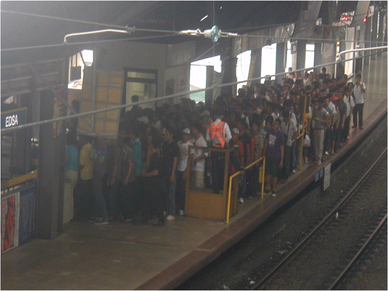 Tagalog: Ito ay kuha sa EDSA LRT station.